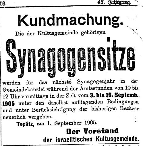 inzerat_synagogensitze